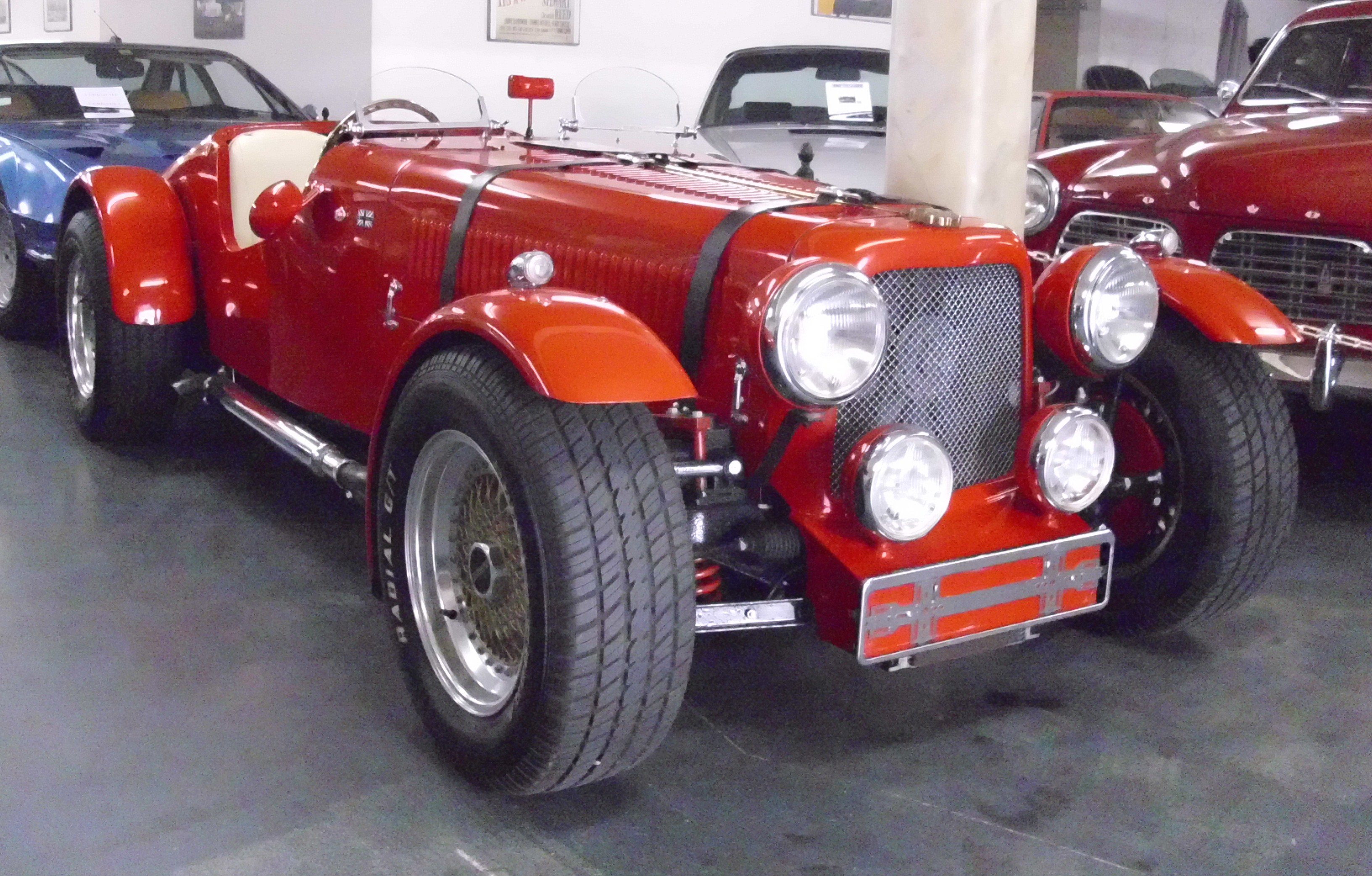 NG 3.5 V8 Special Roadster